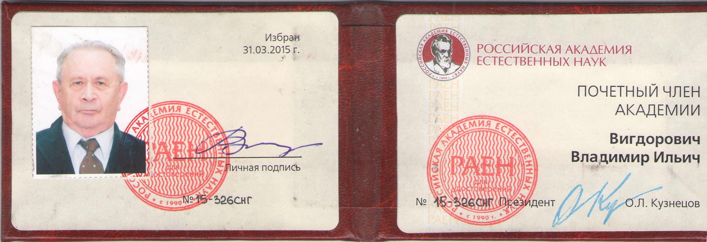 Избран 31.03.2015